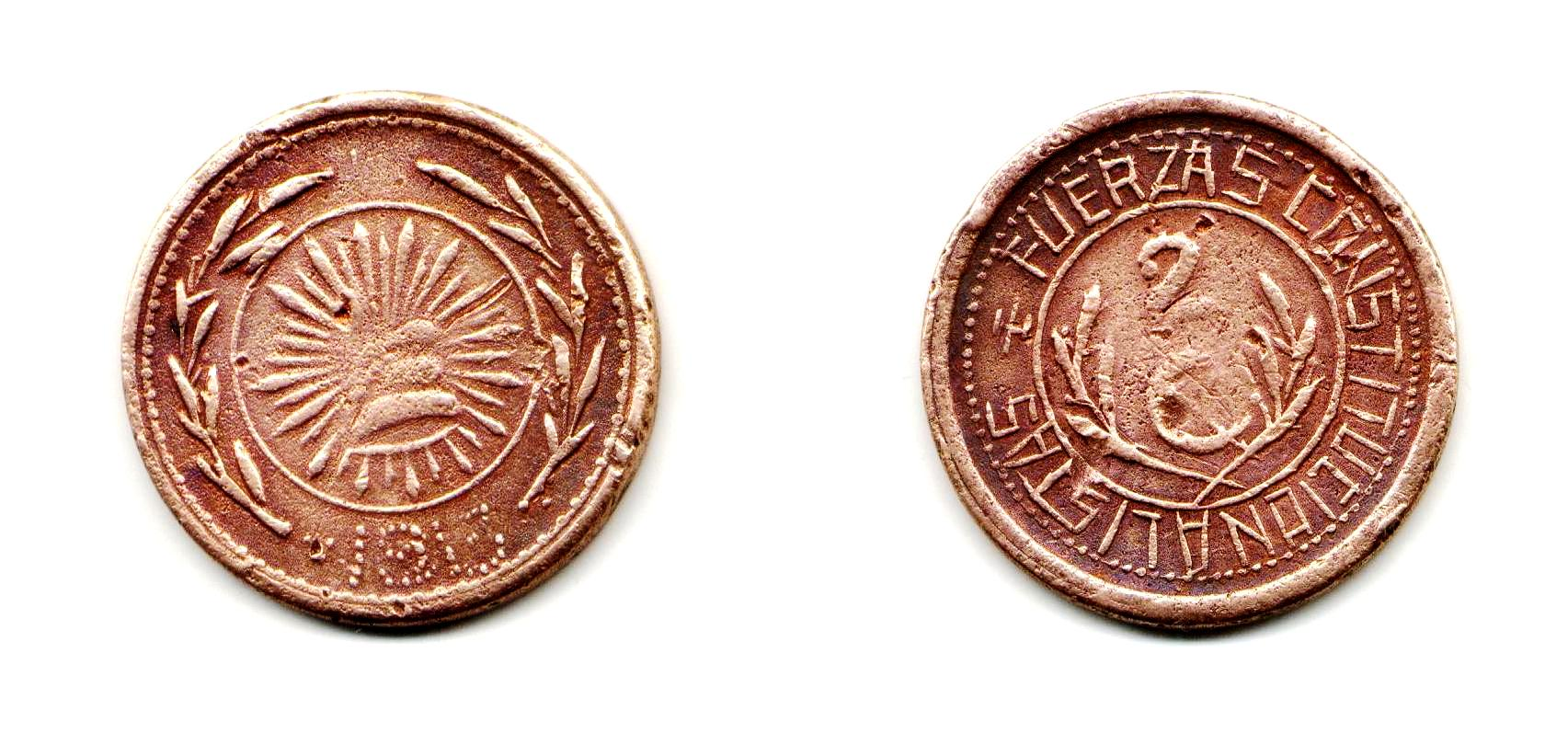 Moneda de 2 centavos acuñada por las fuerzas villistas en Hidalgo del Parral en 1913.